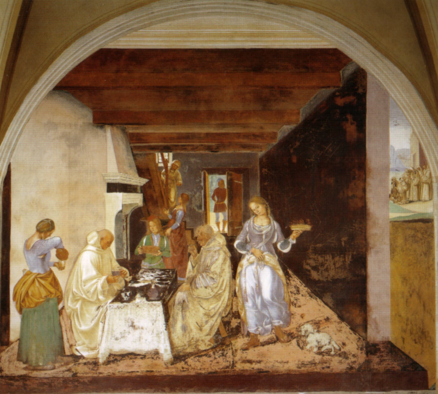 Luca signorelli, storie di san benedetto a monteoliveto, san benedetto rimprovera due monaci che hanno violato la Regola